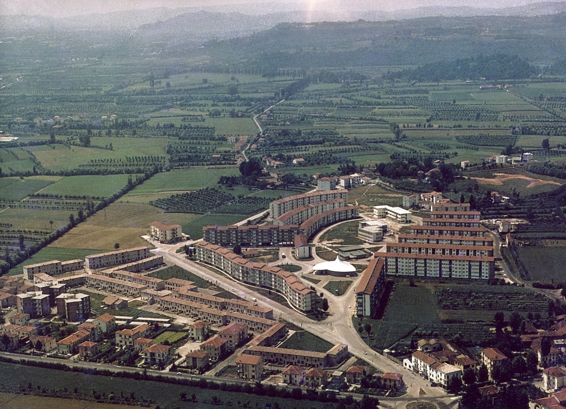 Borracino 1962